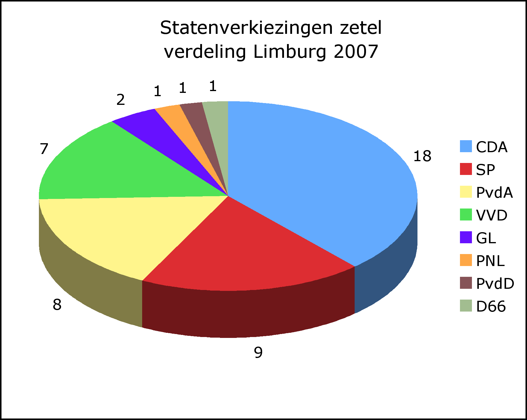 Uitslag provinciale statenverkiezingen Zeeland vertaald in zetels